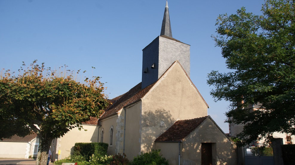 église Saint Martin